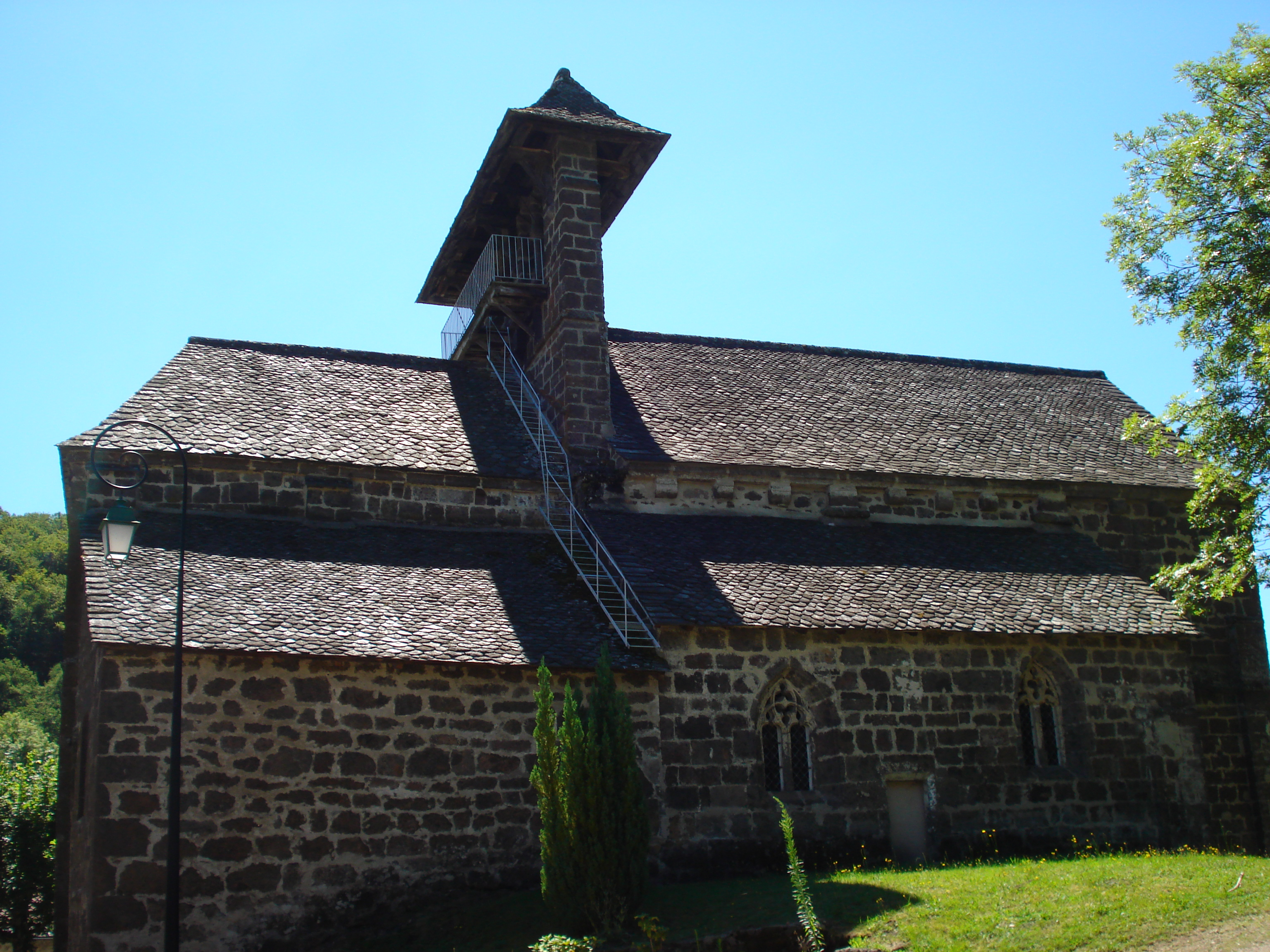 Eglise de Lascelle dans le Cantal en France